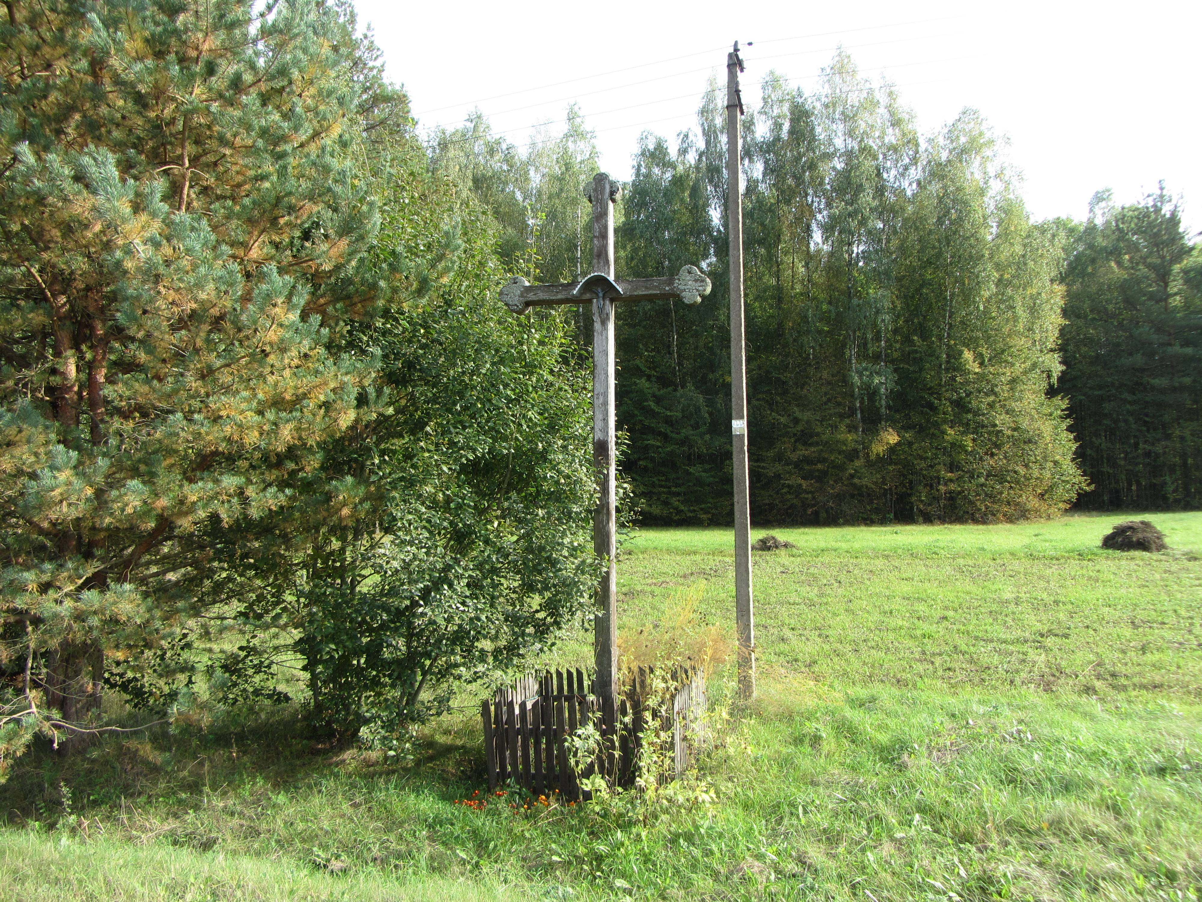 Budriškės 33350, Lithuania